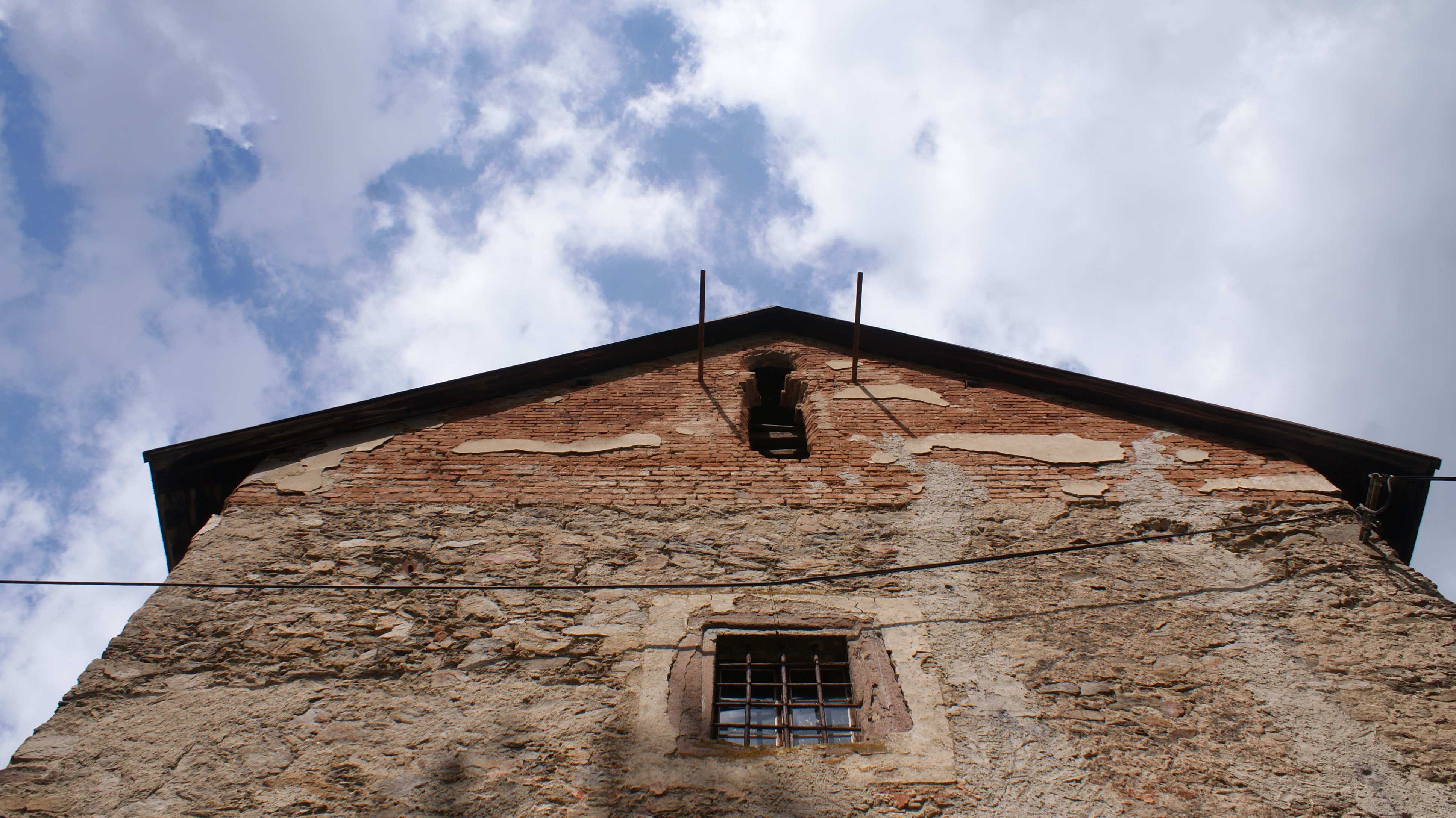 Gotická věž Vodní tvrze Popovice (okres Benešov). Pohled z nádvoří na věž z jihu na sever. Stav před odstraněním novodobé cihlové nástavby a cihlového štítu. Detail okna v jižní stěně.